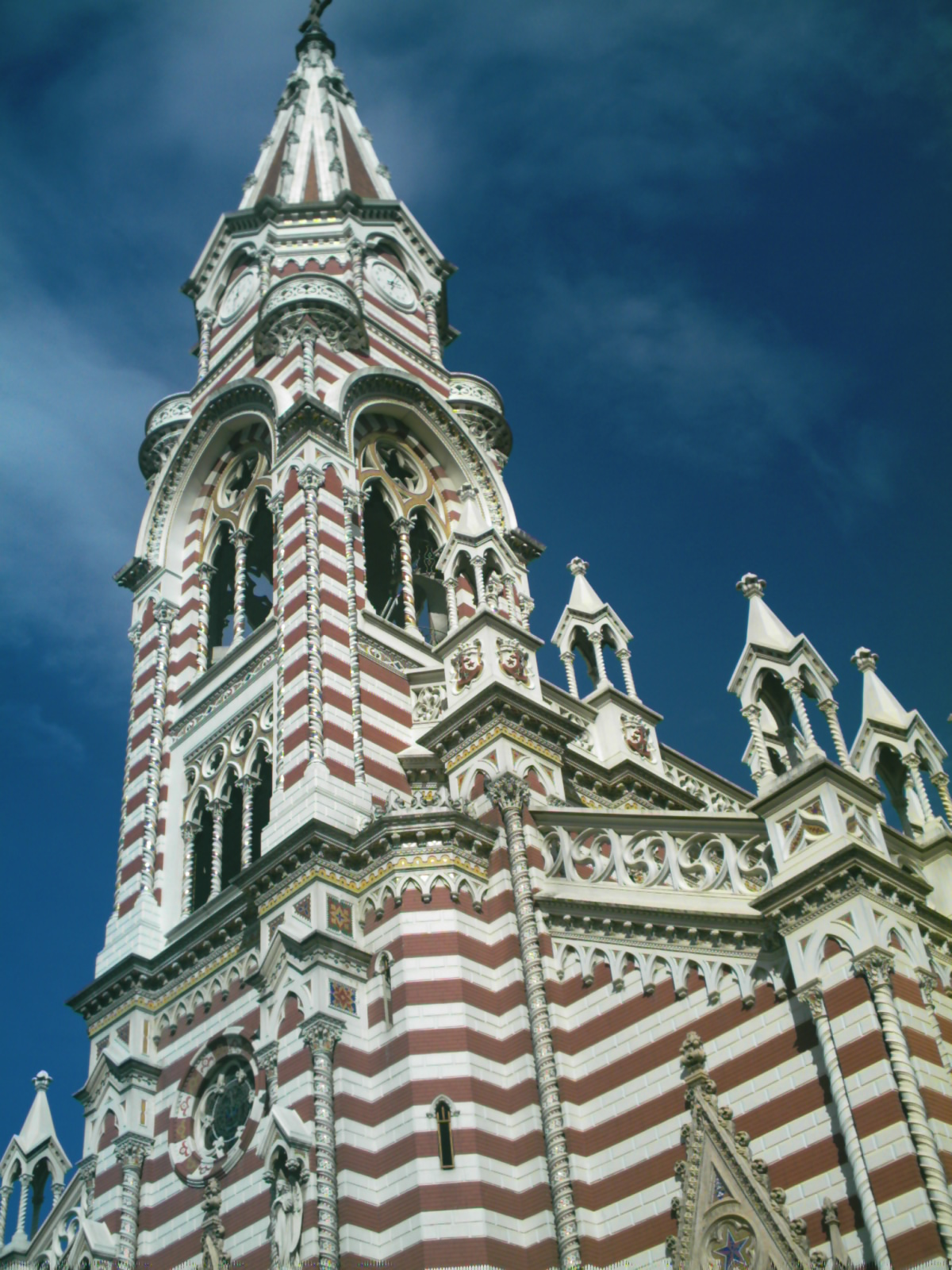 Iglesia del Carmen, ubicada en el barrio La Candelaria de Bogotá